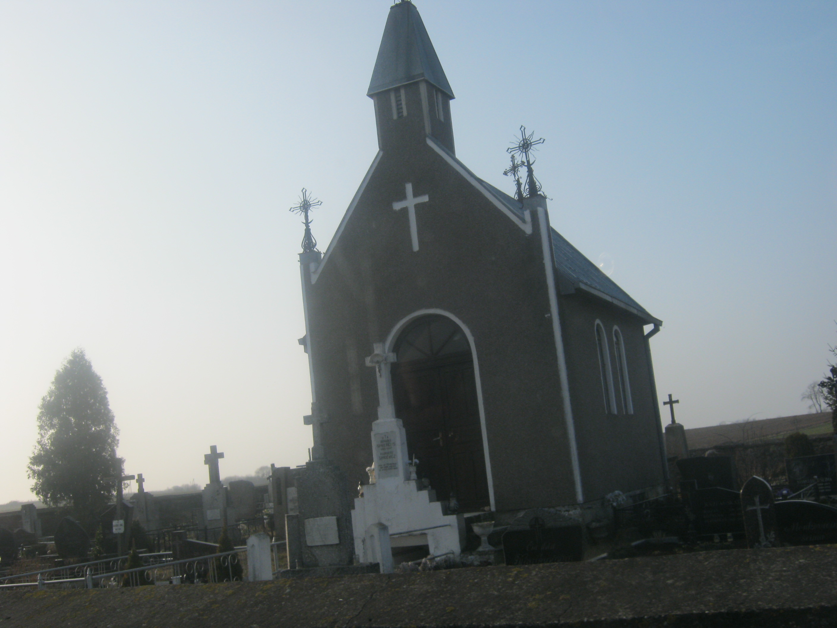 Šilai